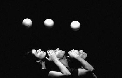 Immagine dello spettacolo Senti. Tre danzatori interagiscono con tre palline bianche che sembrano volare.